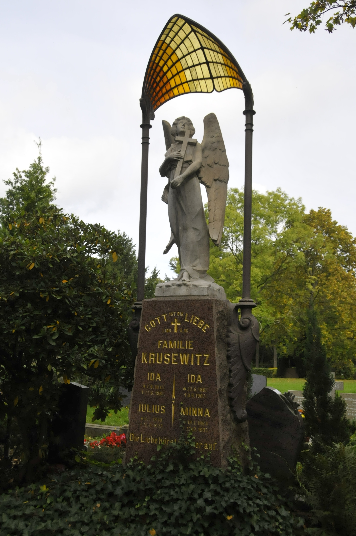 Grabmal der Familie Krusewitz auf dem Gothaer Hauptfriedhof